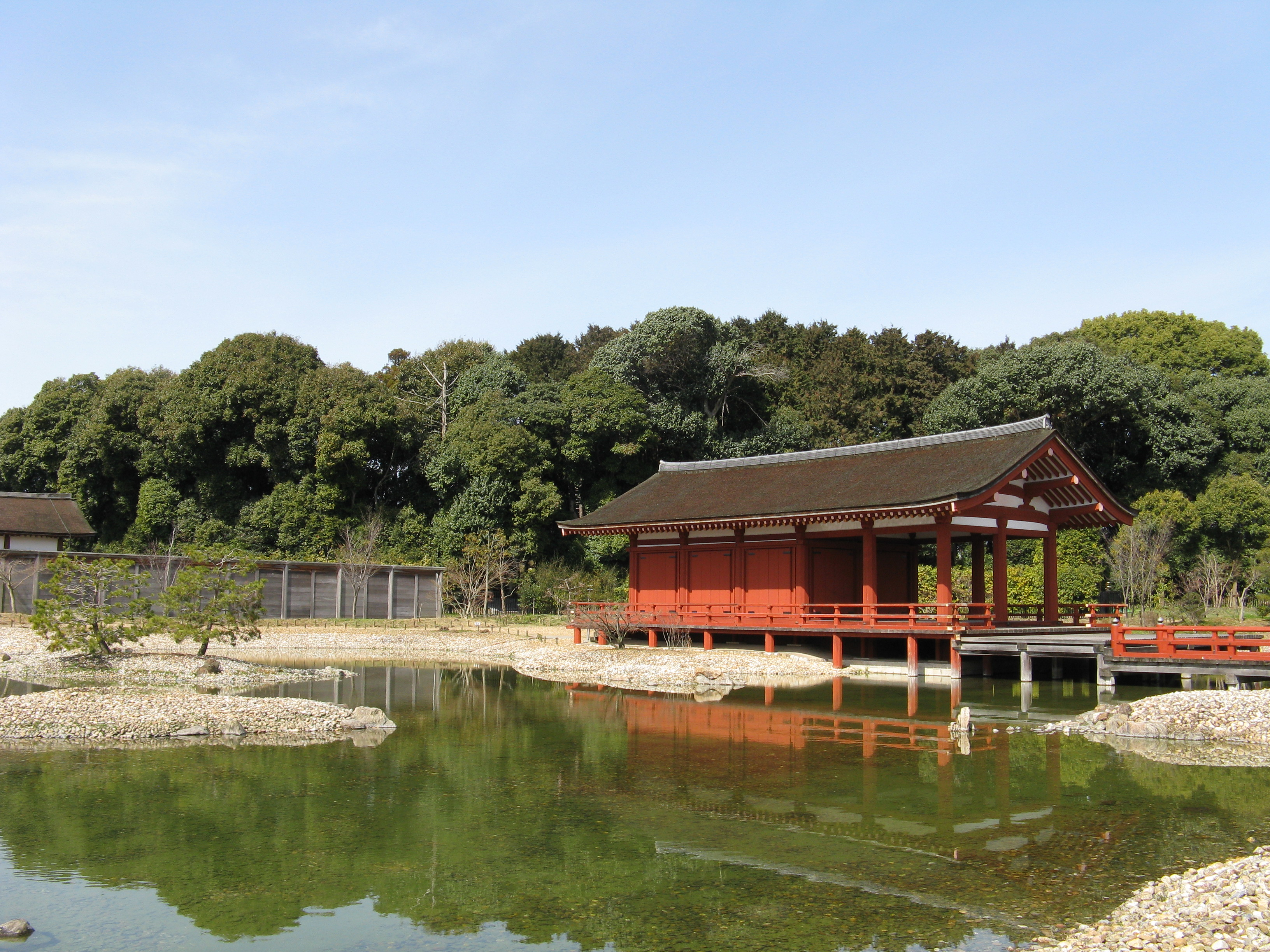 平城京東院庭園